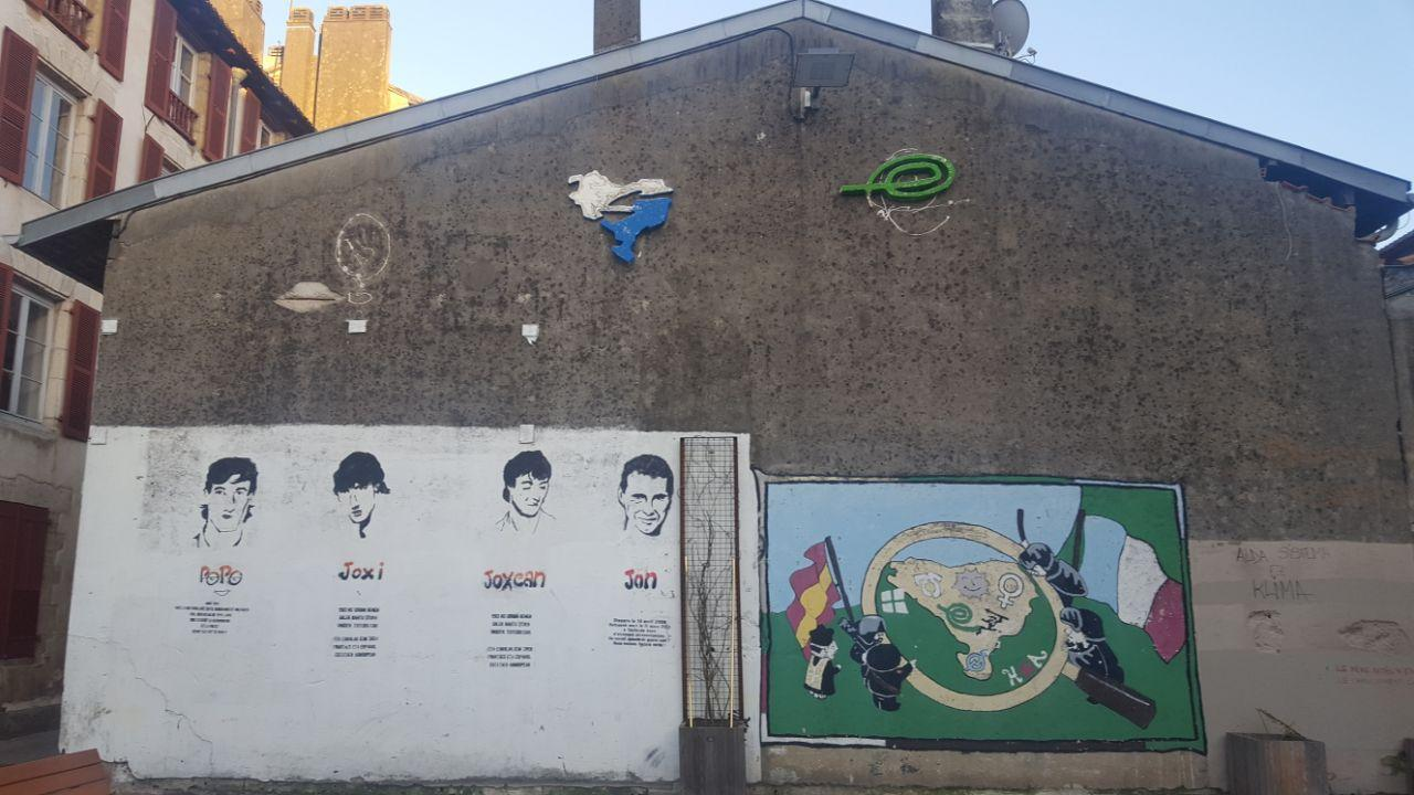 Baiona Ttipiko Patxa Plazan ikus daitezkeen muralak